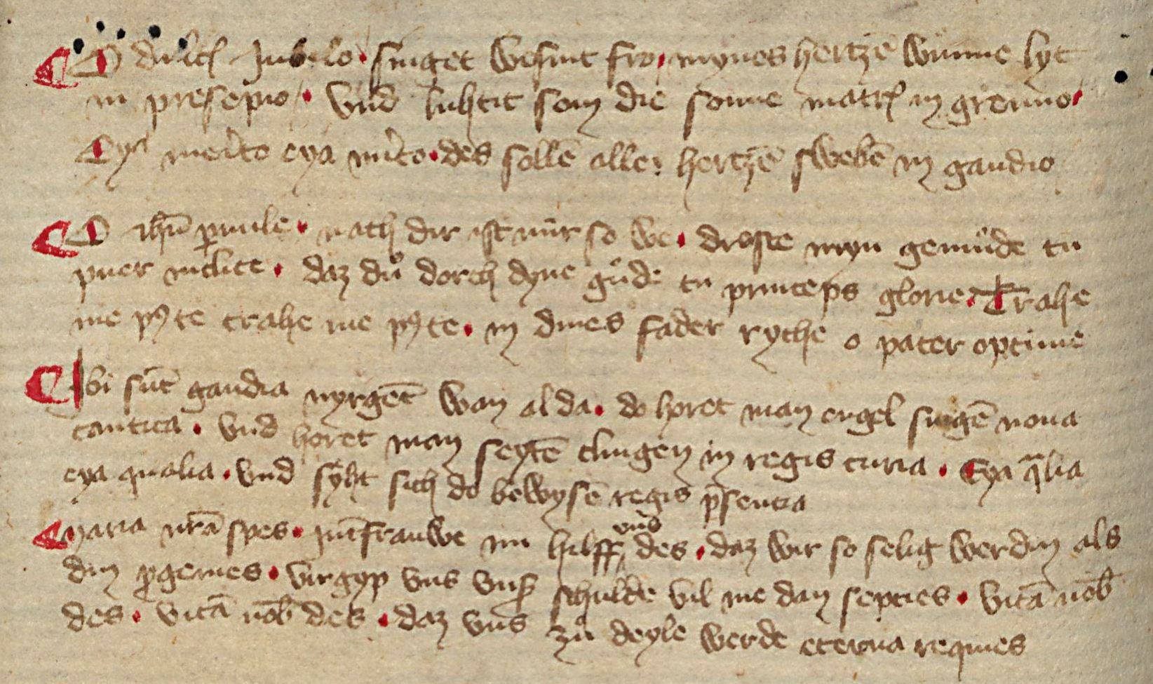 Älteste Überlieferung des Liedes "In dulci jubilo", enthalten in Hs I 164, einer der spätmittelalterlichen theologischen Sammelhandschriften aus Kartausen-Provenienz der Stadtbibliothek Mainz. Vgl. Gisela Kornrumpf: In dulci jubilo. Neue Aspekte der Überlieferungsgeschichte beider Fassungen des Weihnachtsliedes, in: Johannes Spicker (Hrsg.): Edition und Interpretation. Neue Forschungsparadigmen zur mittelhochdeutschen Lyrik. Festschrift für Helmut Tervooren. Stuttgart 2000, S. 159-190.